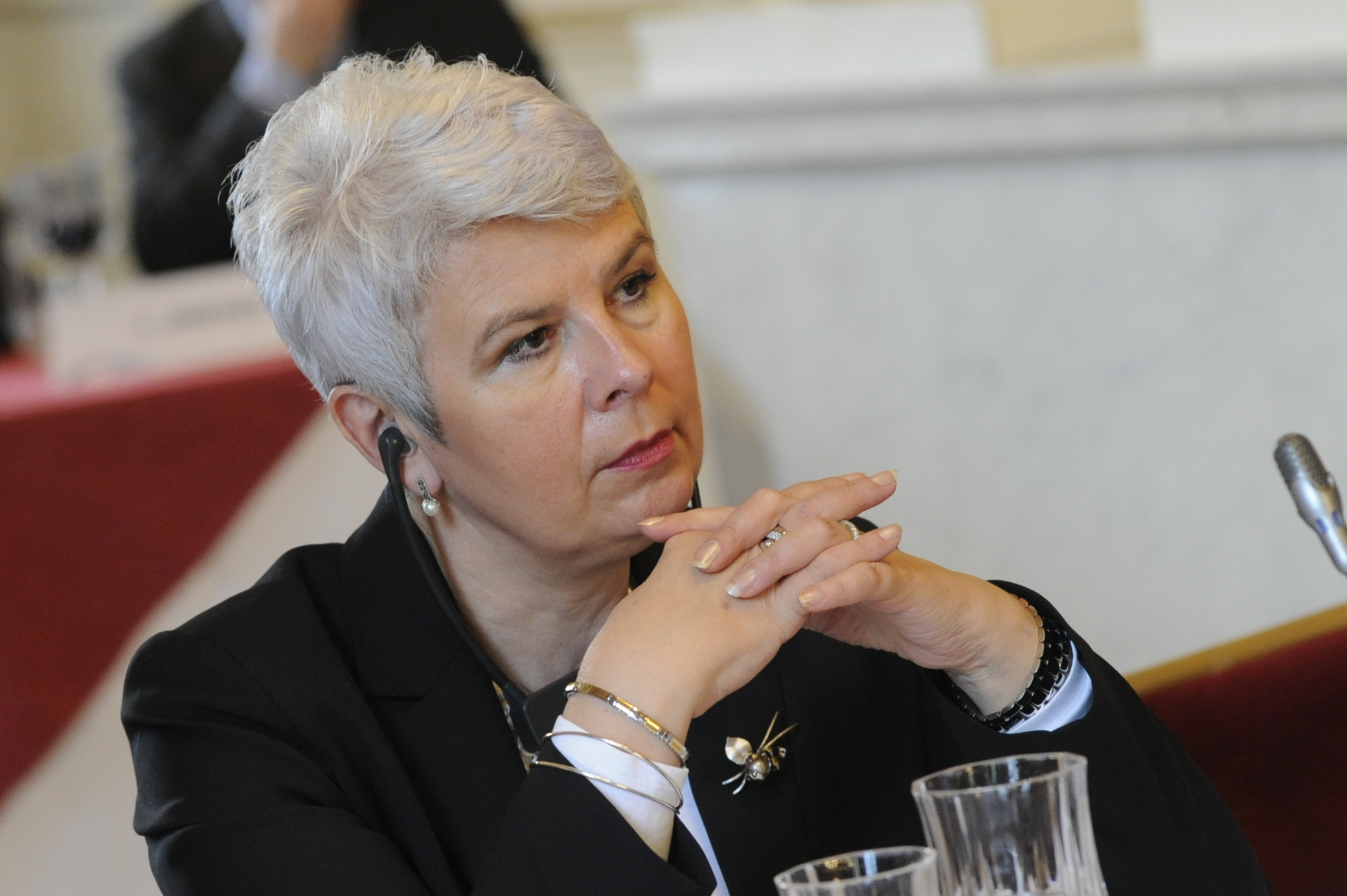 EPP Summit March 2010